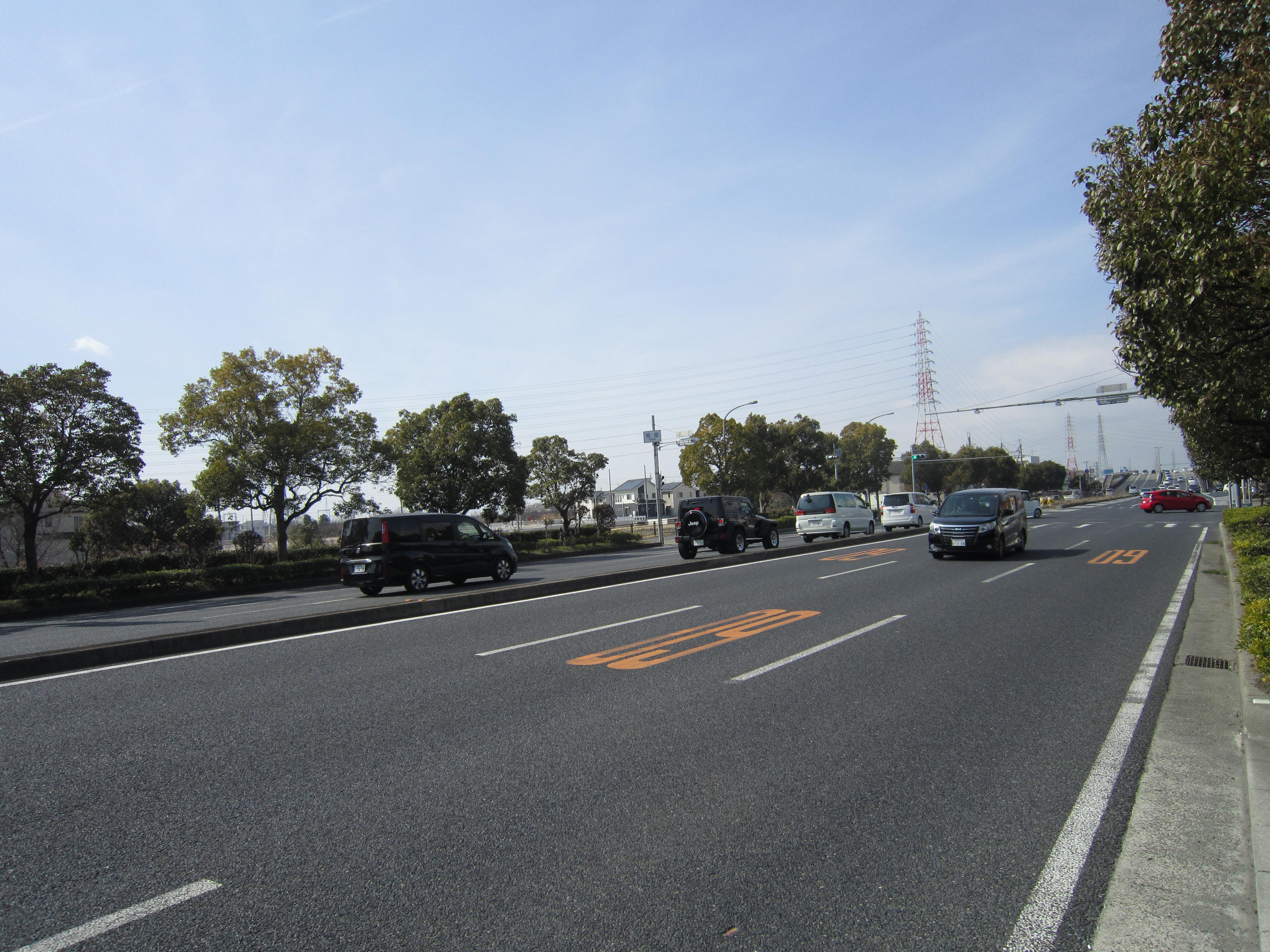 明姫幹線。加古川市内にて撮影。